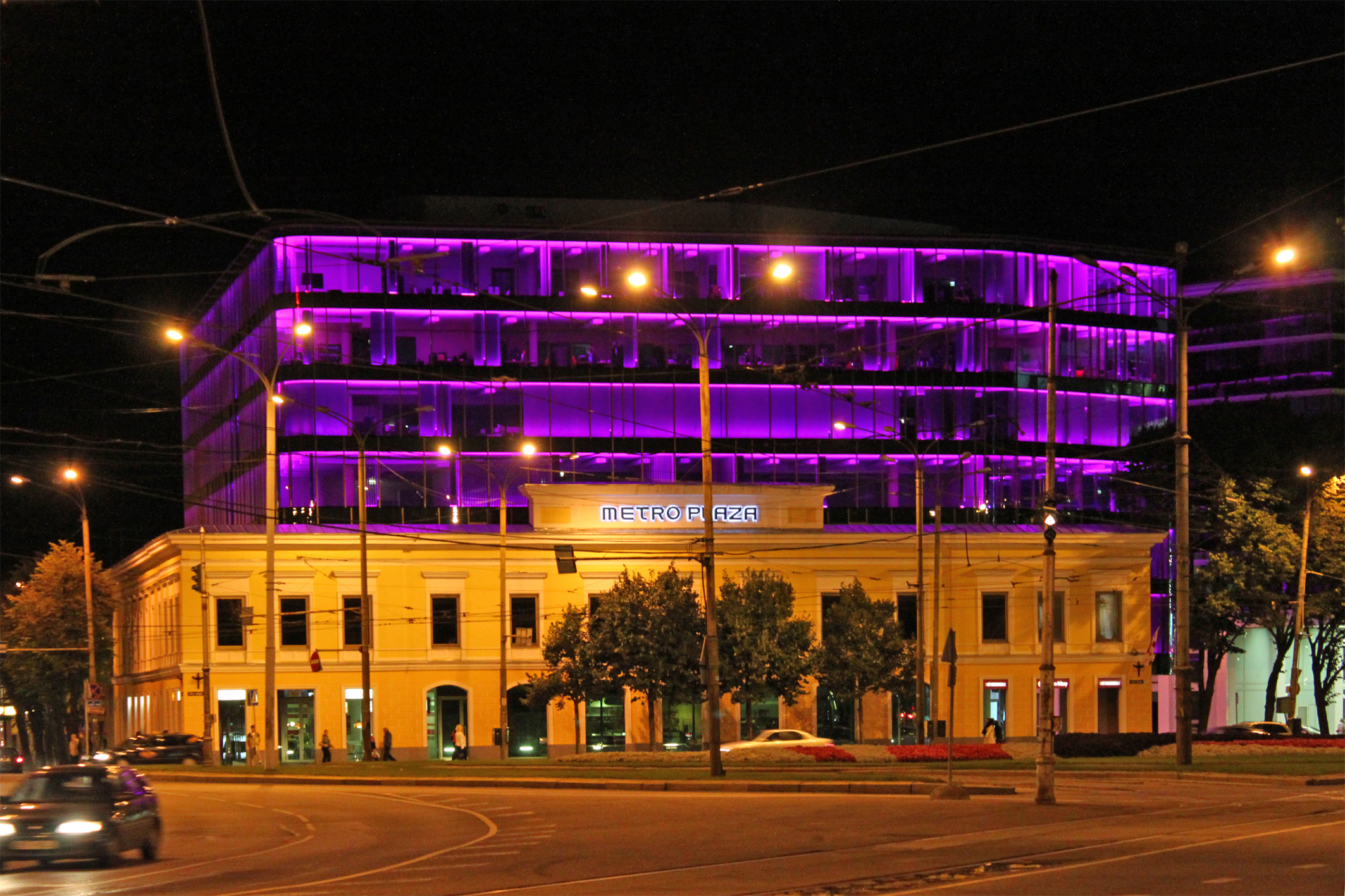 Таллин, площадь Виру ночью